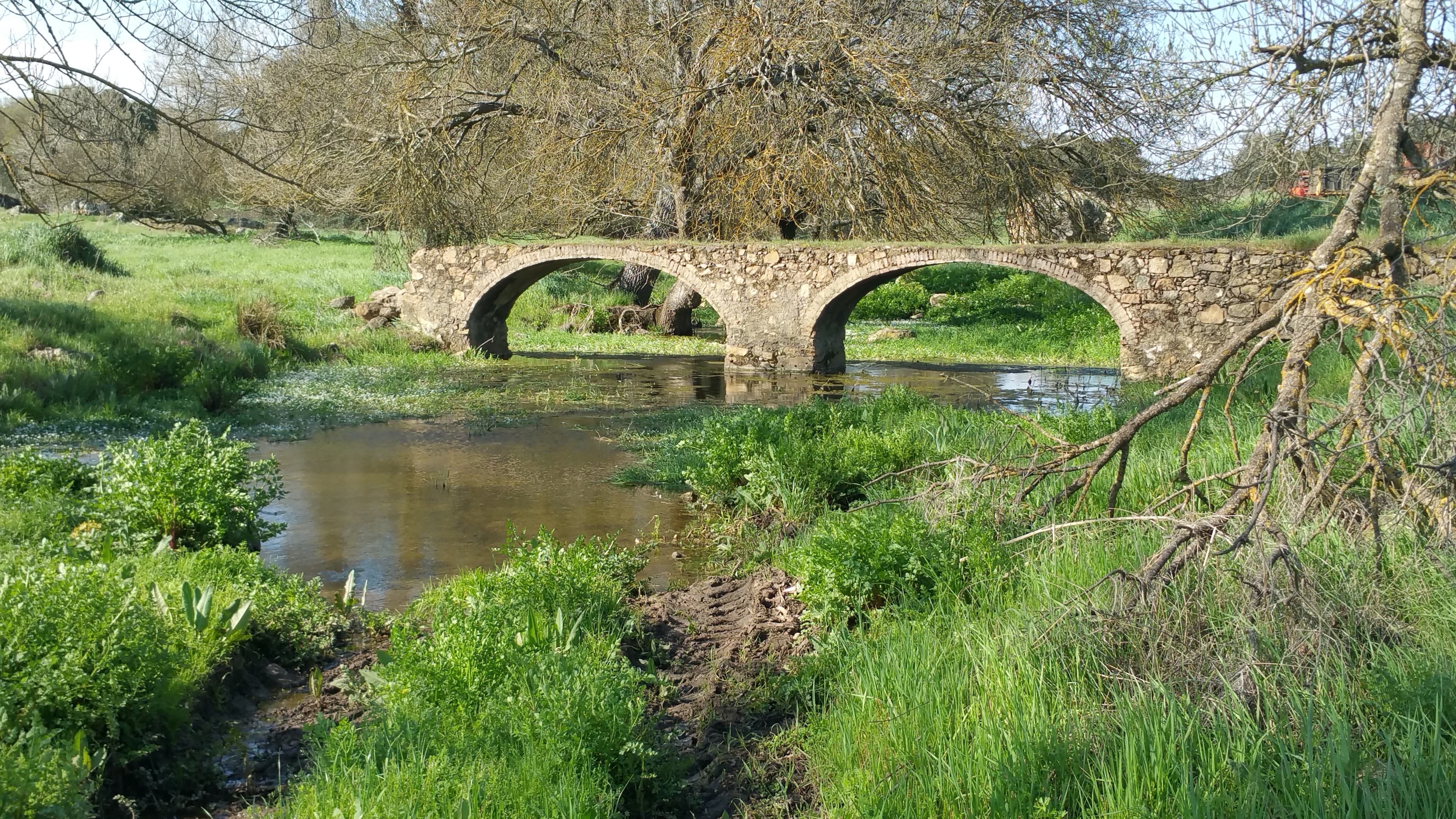 Exteriores del Castillo de los Arcos. Almendral, Badajoz.